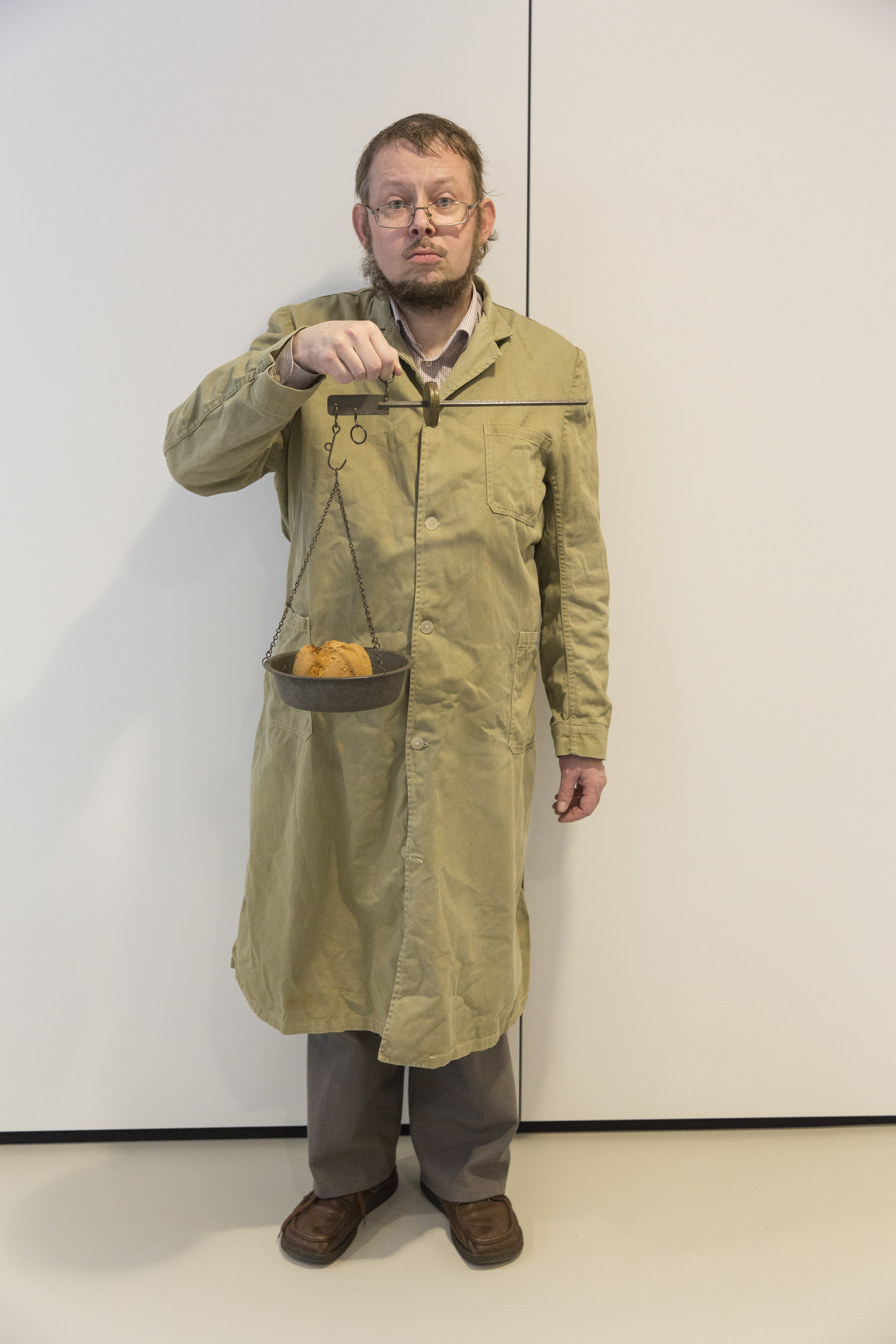 Købmand med bismervægt